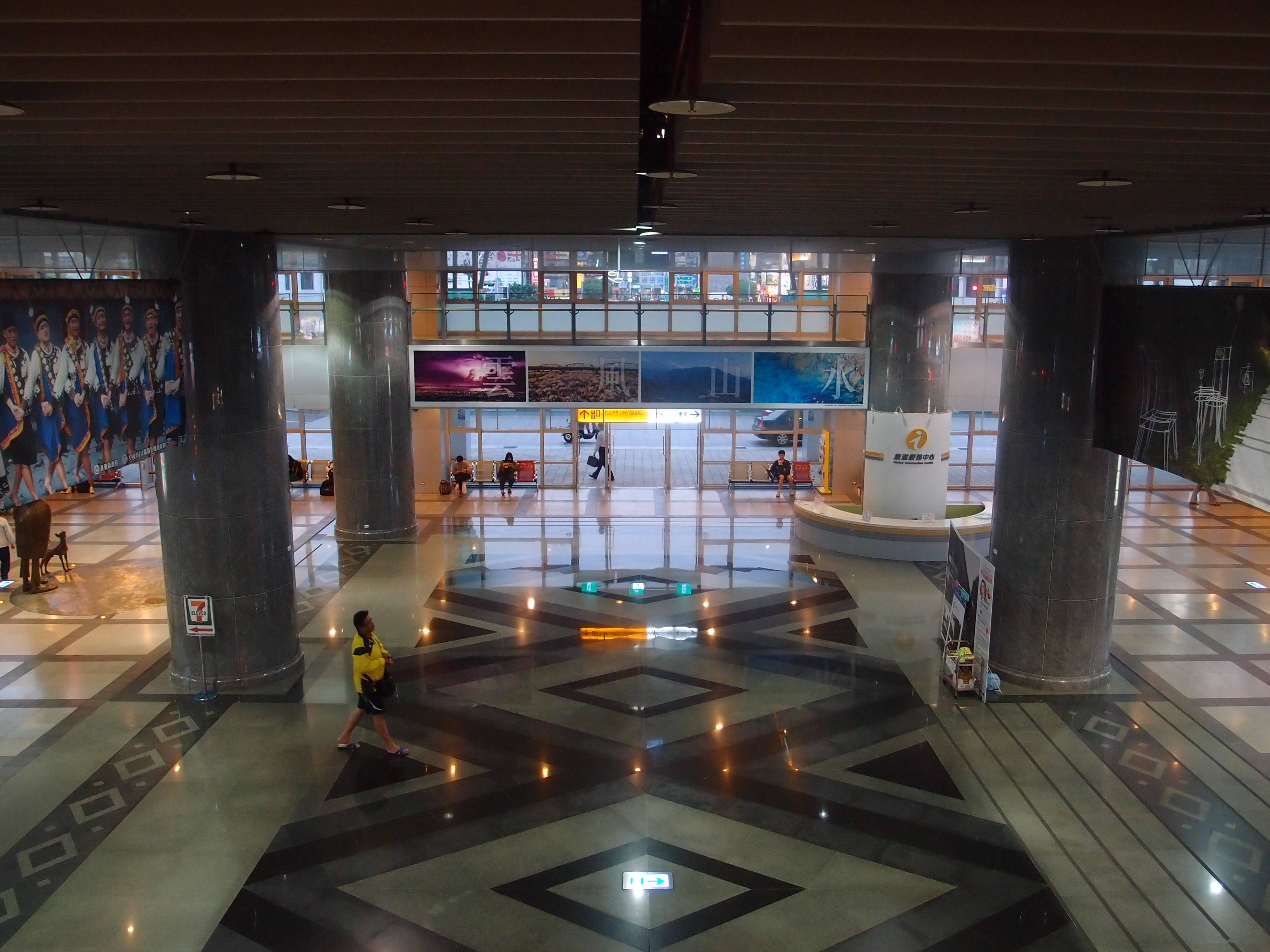 臺灣鐵路管理局屏東車站大廳。